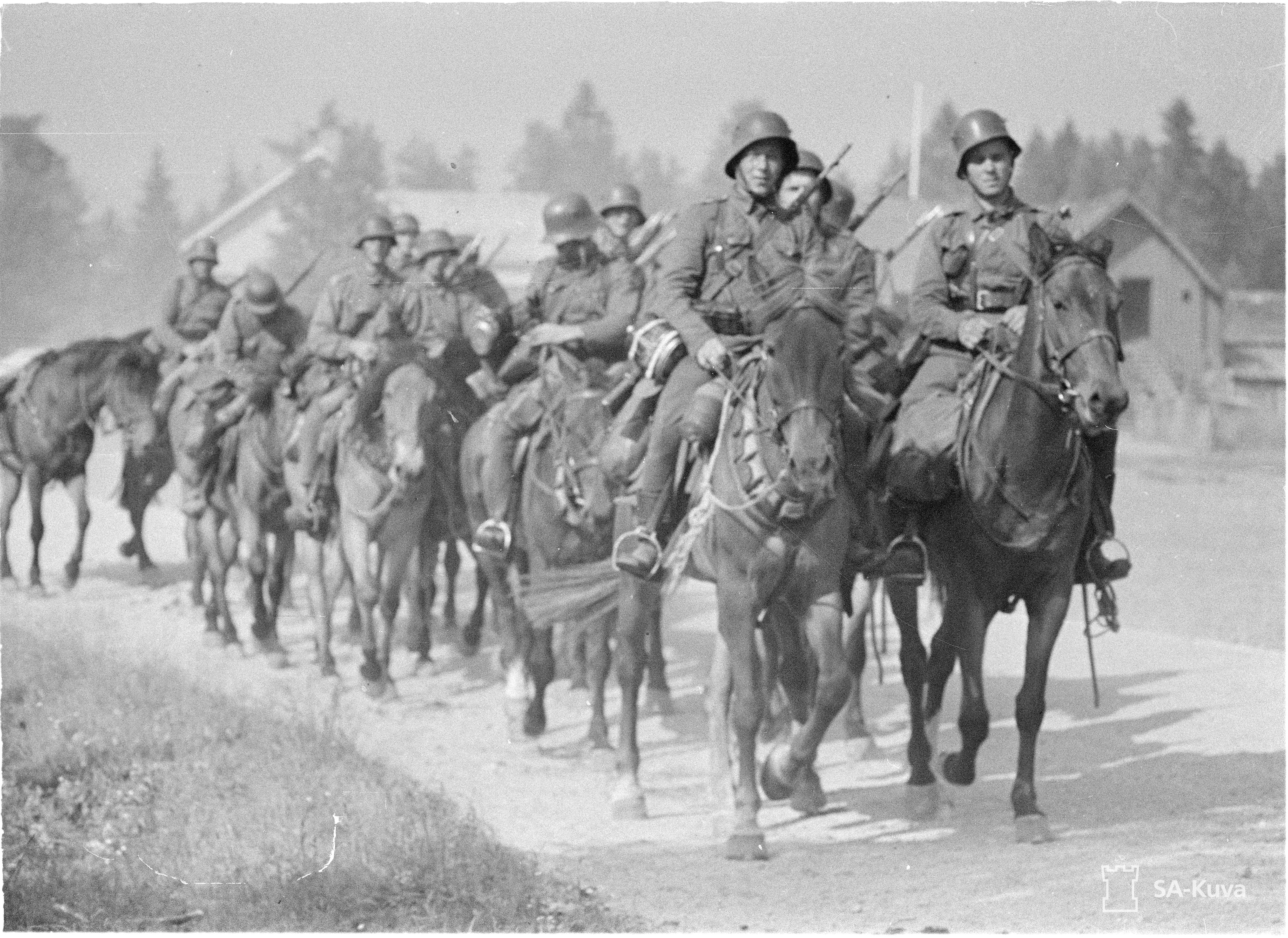 Ratsuväki H.R.R. matkalla etulinjoille. Henkilöt alkaen oikealta: Reino Pakarinen, Lauri Miettinen, Toivo Vasarainen, Teppo Hirvikunnas, Eino Sihvonen, Veikko Halonen (jolta tiedot), Arttu Tenhunen, Pekka Huotari, Pentti Virkkunen, Yrjö Ahonpää, Antero Väyrynen.